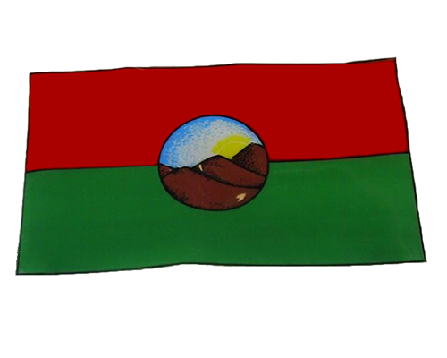 La bandera del Municipio de Turbaco esta compuesta por dos colores: Rojo y Verde. A su ves en el centro de esta tiene un circulo con un paisaje de demuestra nuestra geografía.